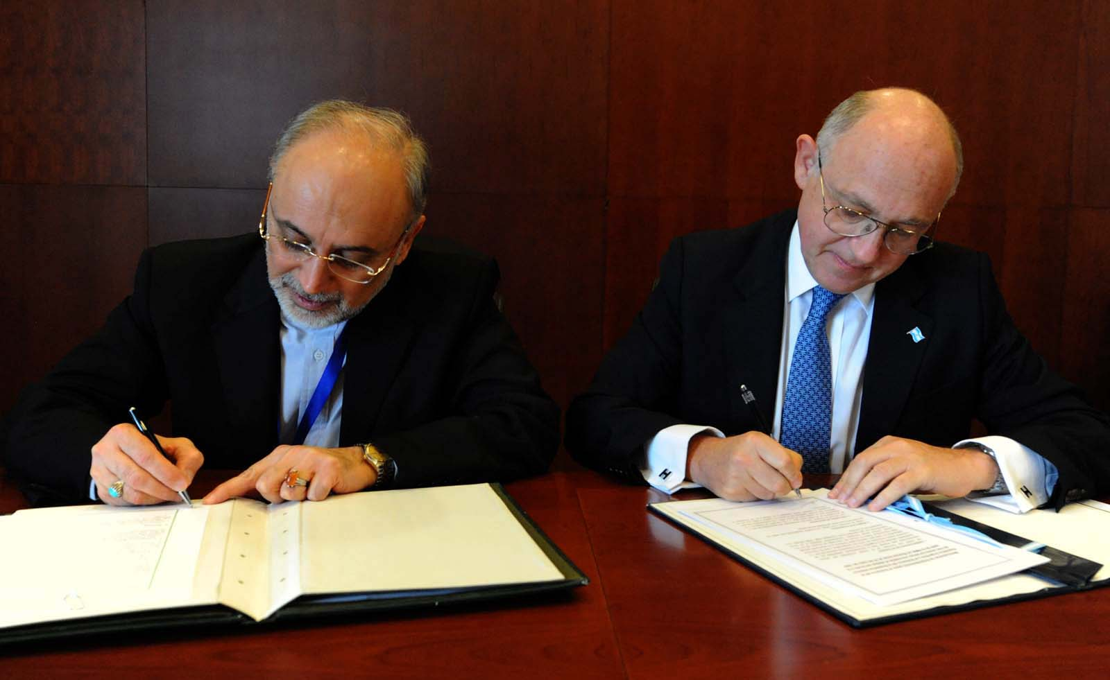 Memorándum de Entendimiento entre el Gobierno de la República Argentina y el Gobierno de la República Islámica de Irán sobre los temas vinculados al ataque terrorista a la sede de la AMIA